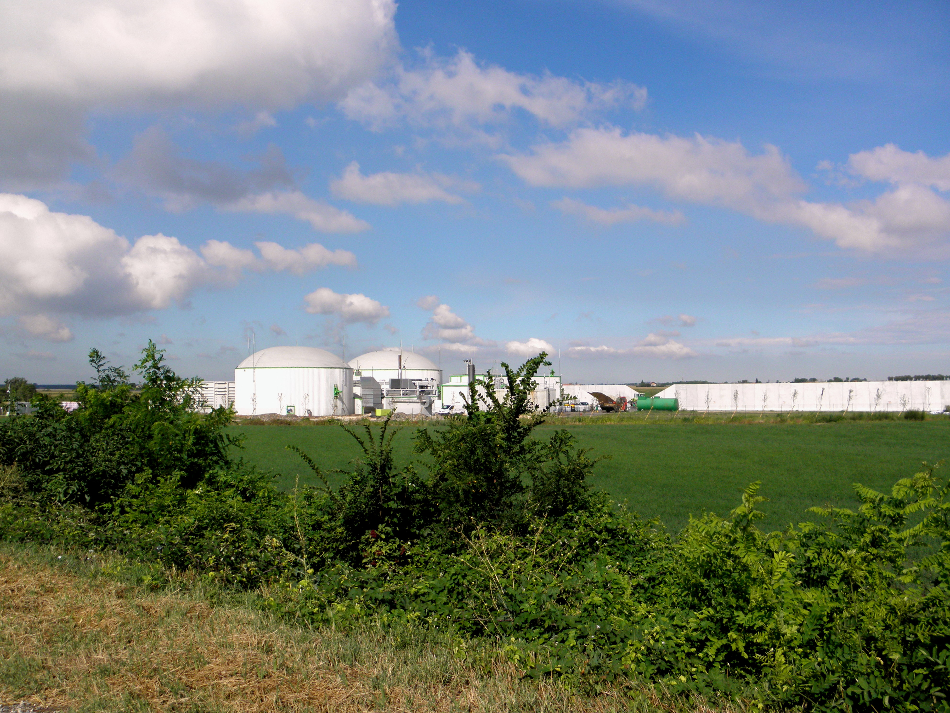 Costa di Rovigo: impianto di biogas (centrale a biomassa FRI-EL da 999 kW) sita nel territorio comunale.